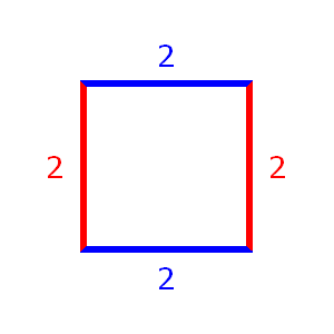 Description Schéma du périmètre d'un carré Date10 May 2009SourceOwn work by the original uploaderAuthorMicroCitron Schéma du périmètre d'un carré